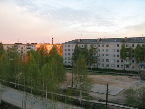 Детская площадка в посёлке Луковецкий. Вид с 5 этажа